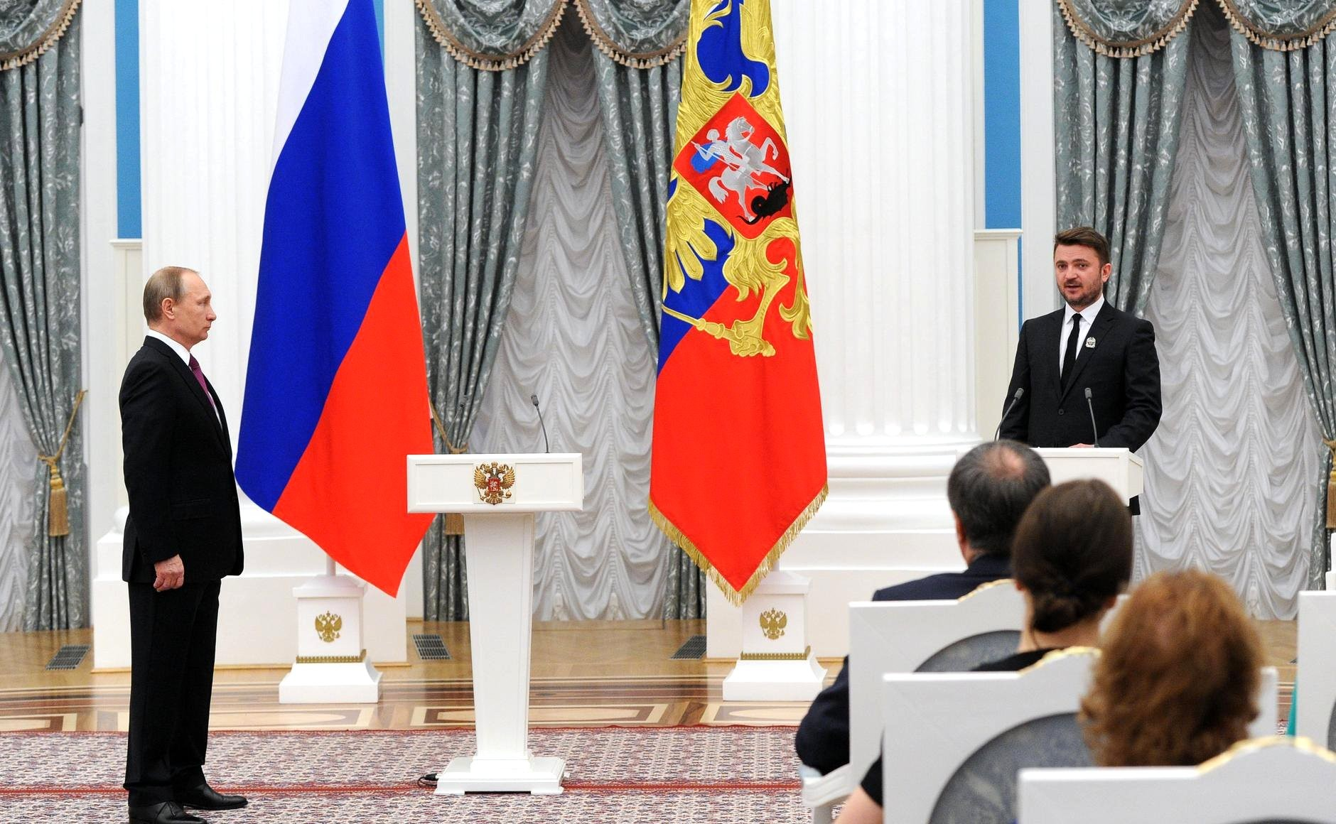 Вручение премий Президента молодым деятелям культуры и премий за произведения для детей и юношества. Премии Президента Российской Федерации для молодых деятелей культуры 2015 года удостоен музыкант Владислав Лаврик